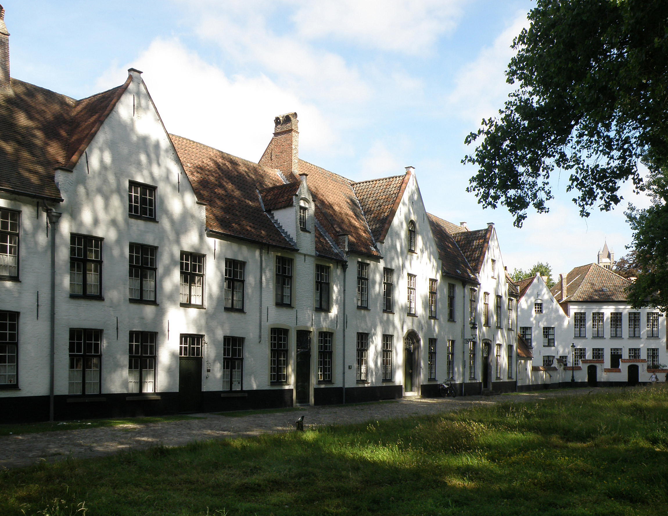 Begijnhof (Brugge). Begijnenhuizen nr. 22 (rechts) & 24 (links).